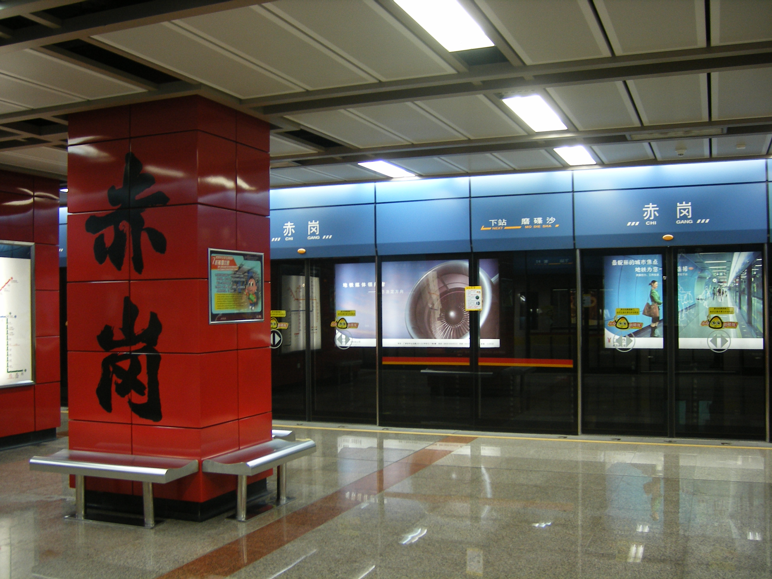 广州地铁二号线赤岗站站台。